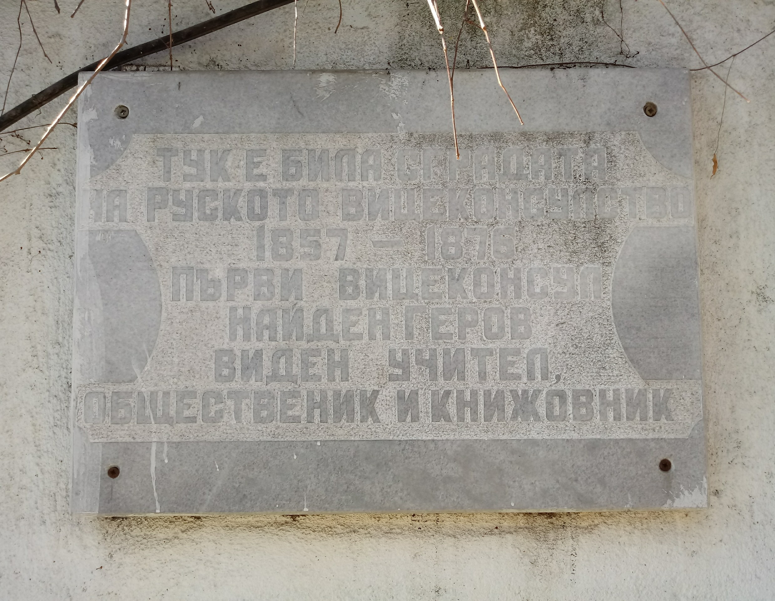 Nayden Gerov memorial plaque, Plovdiv